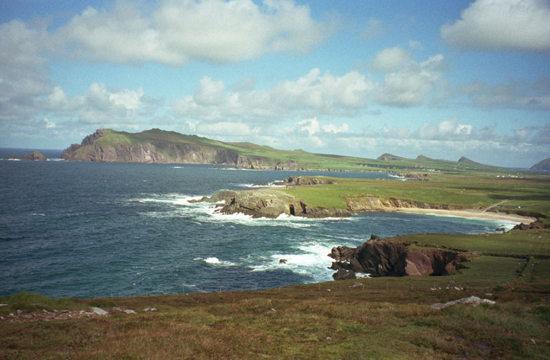 Dingle